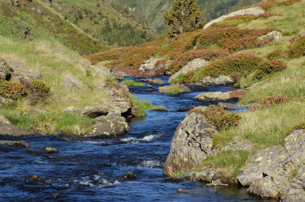 Riu de Tristaina This is a a photo of a river in Andorra with id: IEA-R-48